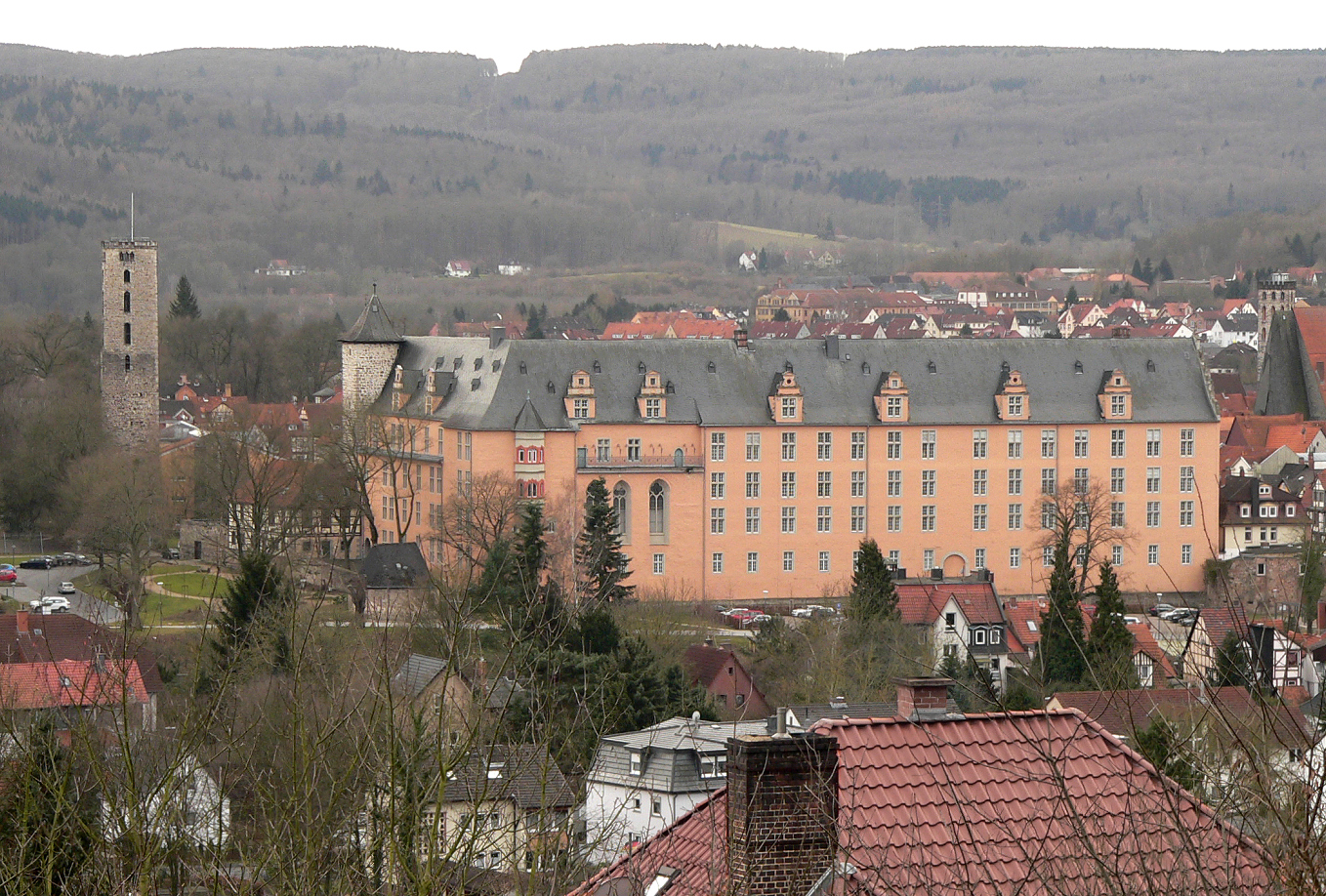 Welfenschloss Münden vom Questenberg gesehen, links Stadtmauerturm